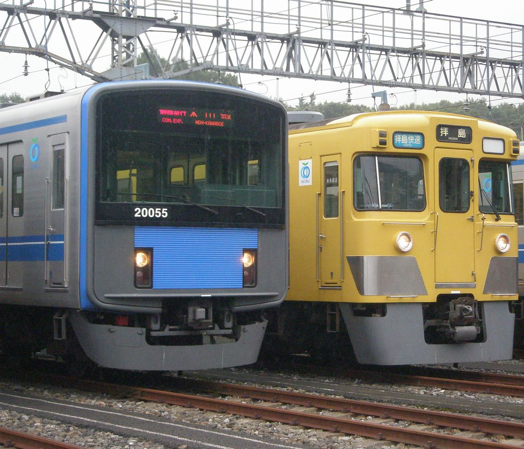 2008年6月14日から2012年6月29日まで運転された拝島快速（写真右側）。2011年8月27日 南入曽にて。